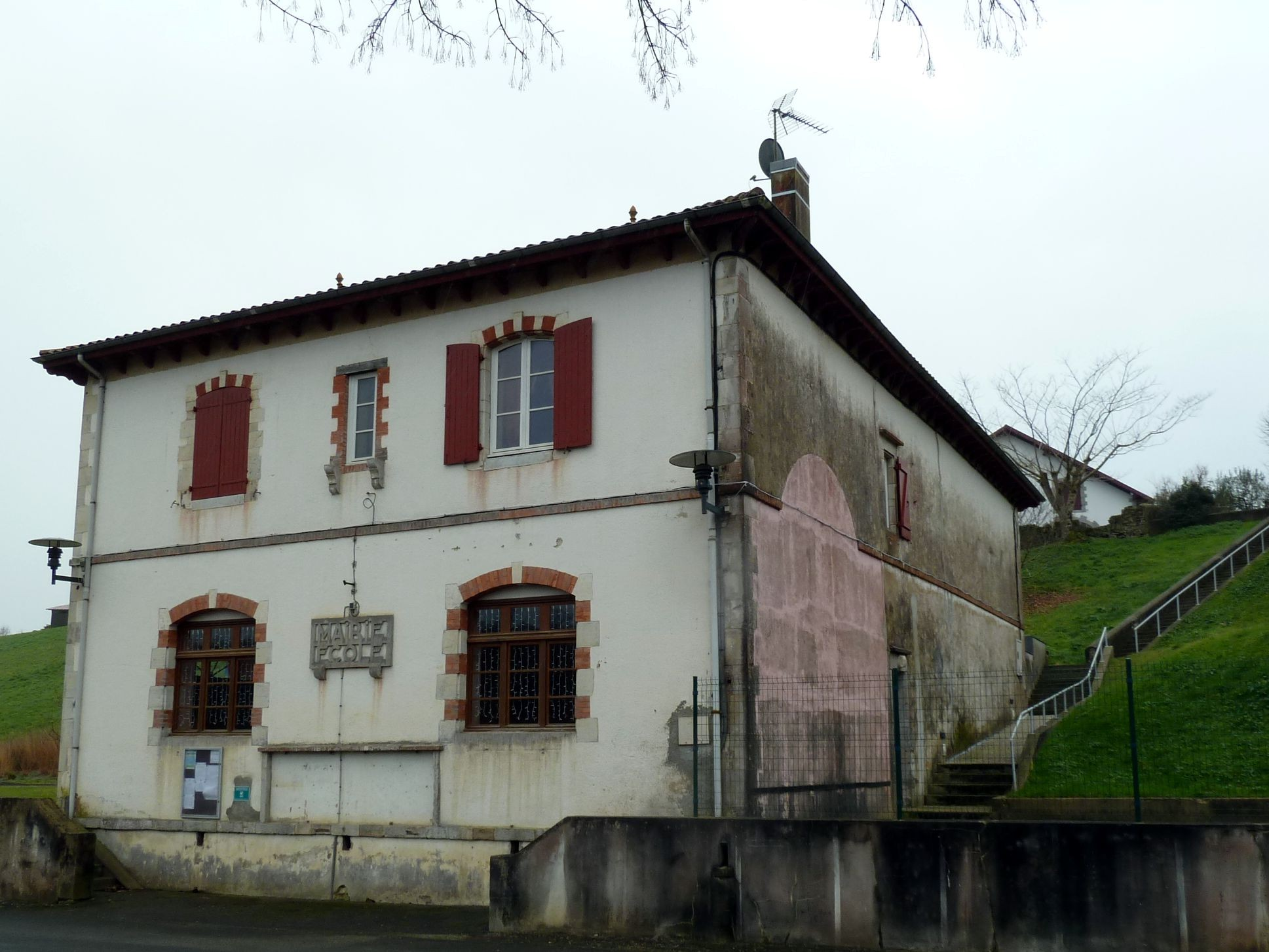 Mairie ancienne_02